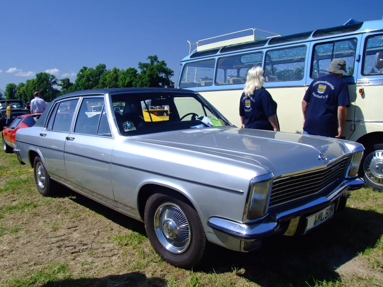 Opel Diplomat E Baujahr: 1972 165 PS 2800 ccm Quelle: selbst fotografiert, 06/2007 Fotograf: Späth Chr.